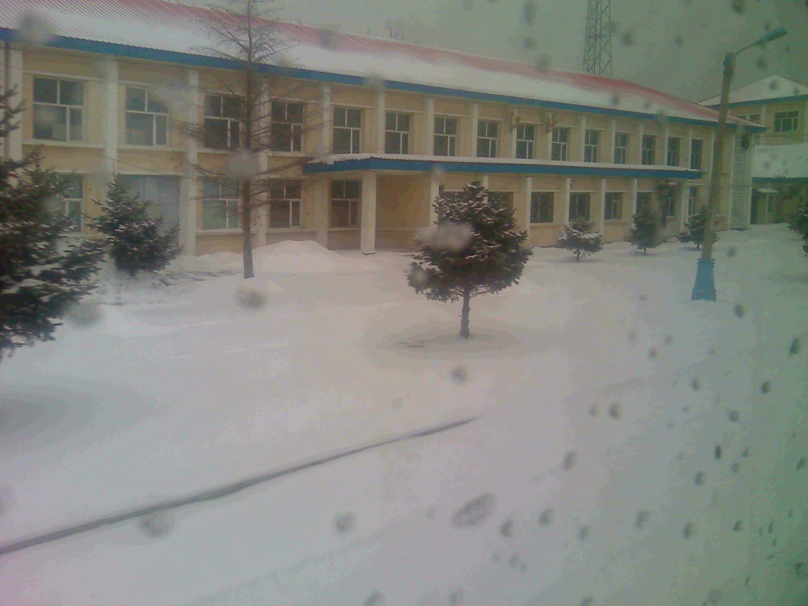 江北站候车室